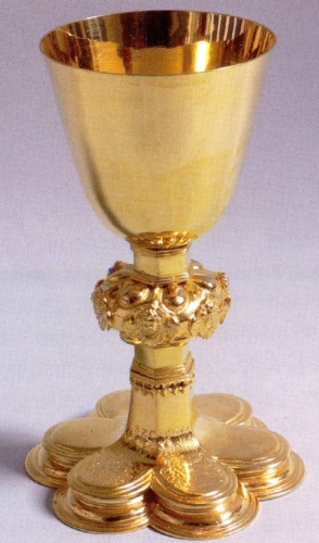 Abendmahlskelch, von der Familie Storch 1622 für die damals evangelische Bergkirche Klaus gestiftet. Nachdem die Storchs das Land in der Gegenreformation verlassen mussten, wurde dieser Kelch von deren Nachkommen der evangelischen Kirche in Vach bei Fürth (Bayern) gestiftet.